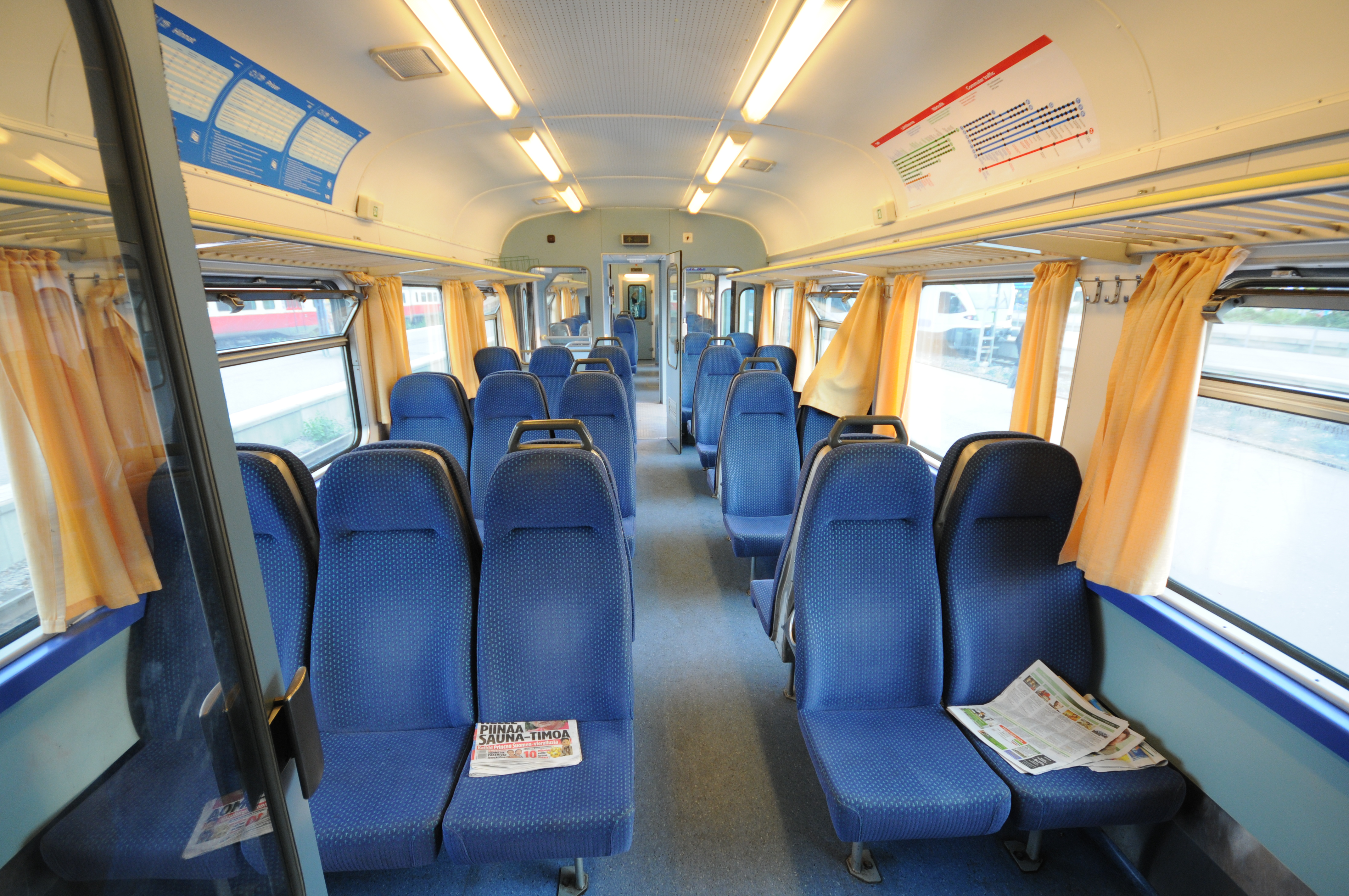 Helsinki Hauptbahnhof